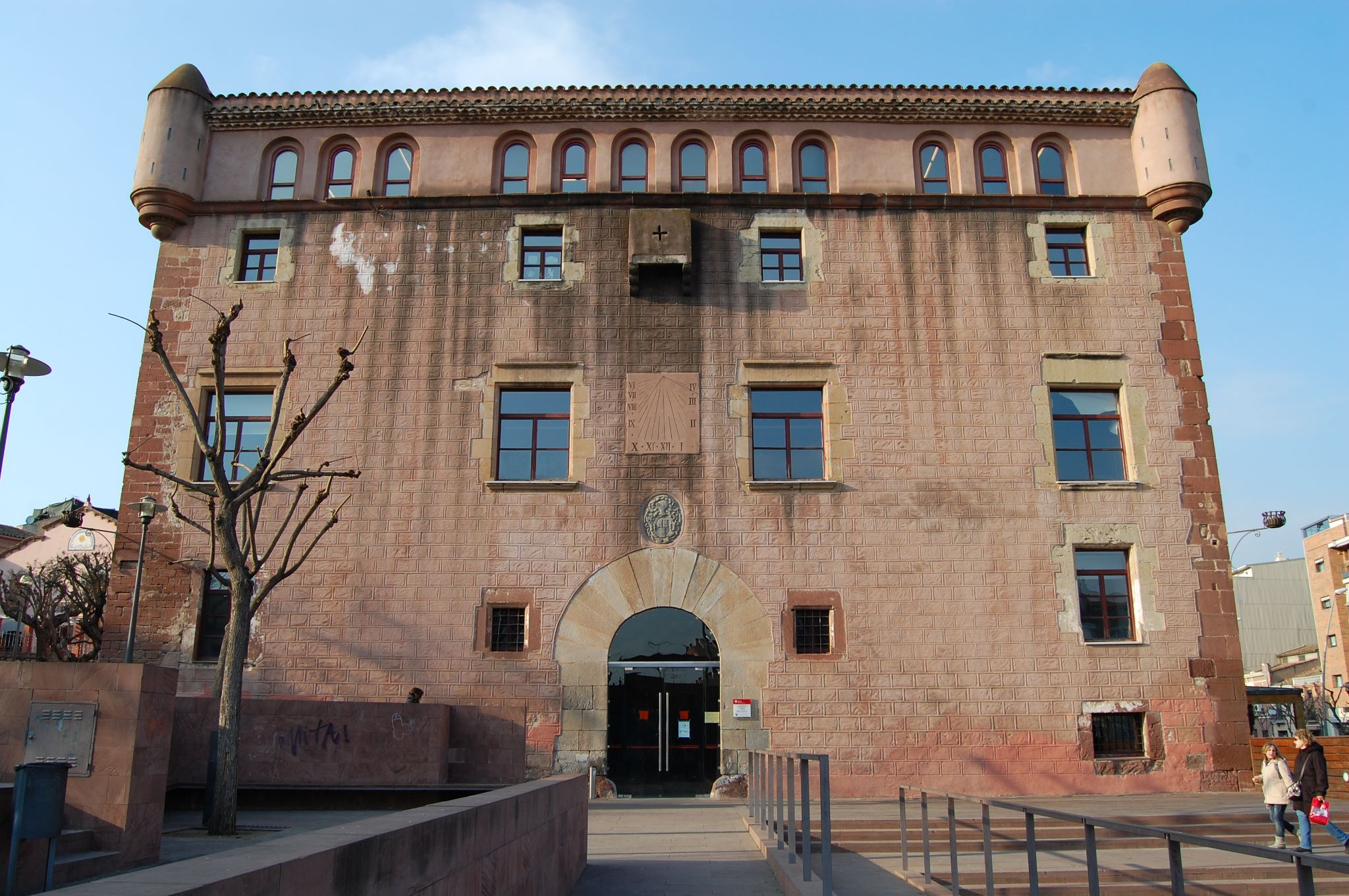 Castell de Pallejà, seu de la Biblioteca municipal de Pallejà